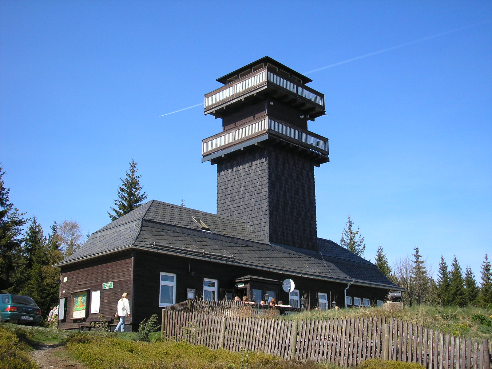 Leipziger Turm auf dem Rauhhügel bei Schmiedefeld (Lichtetal) - Thüringen